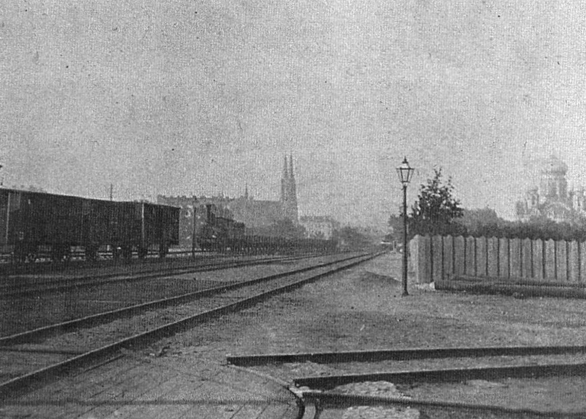 Bocznice Dworca Petersburskiego w Warszawie